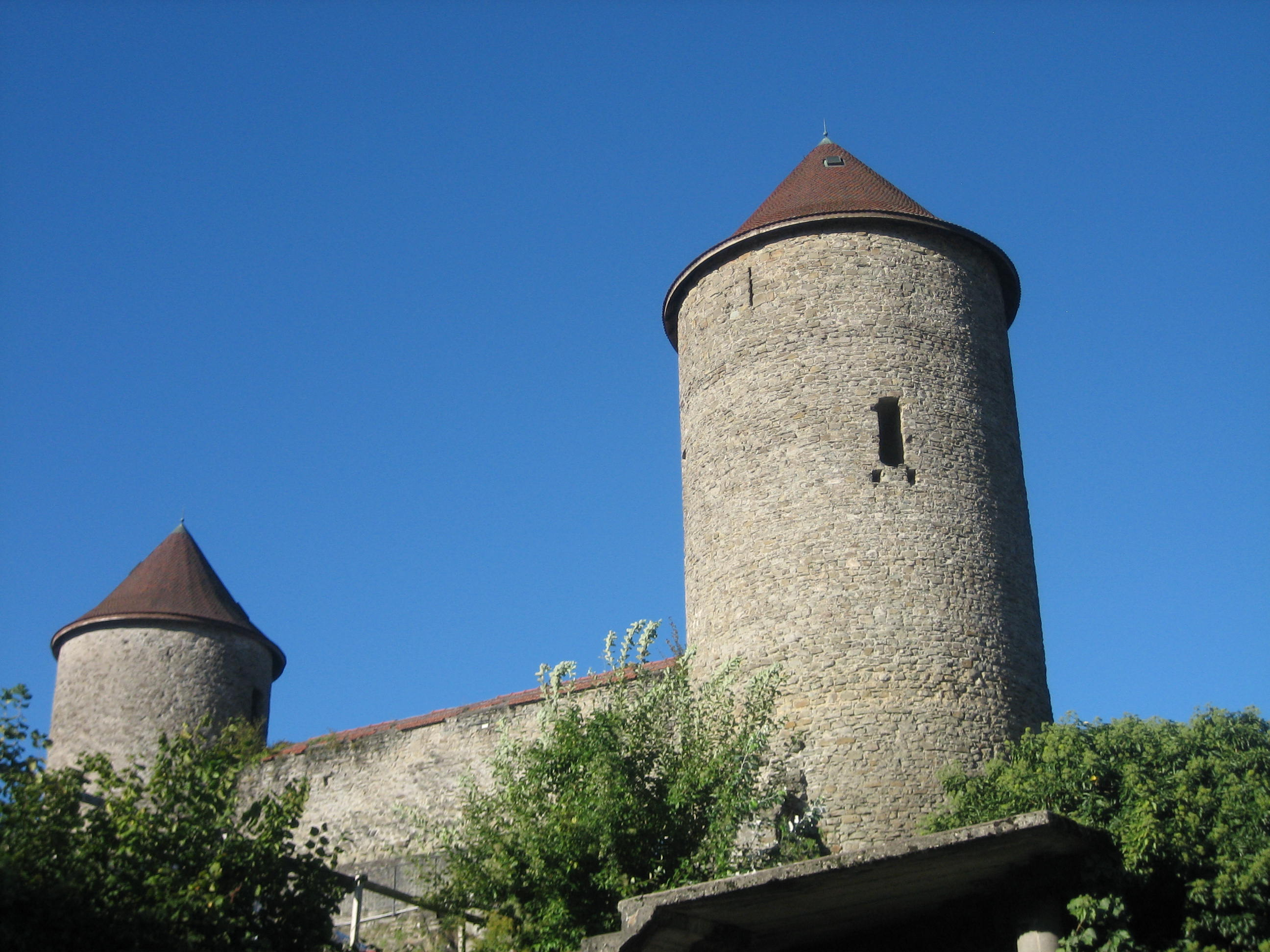 Château Béatrix de Faucigny, Bonneville - construit au 13ème siècle .